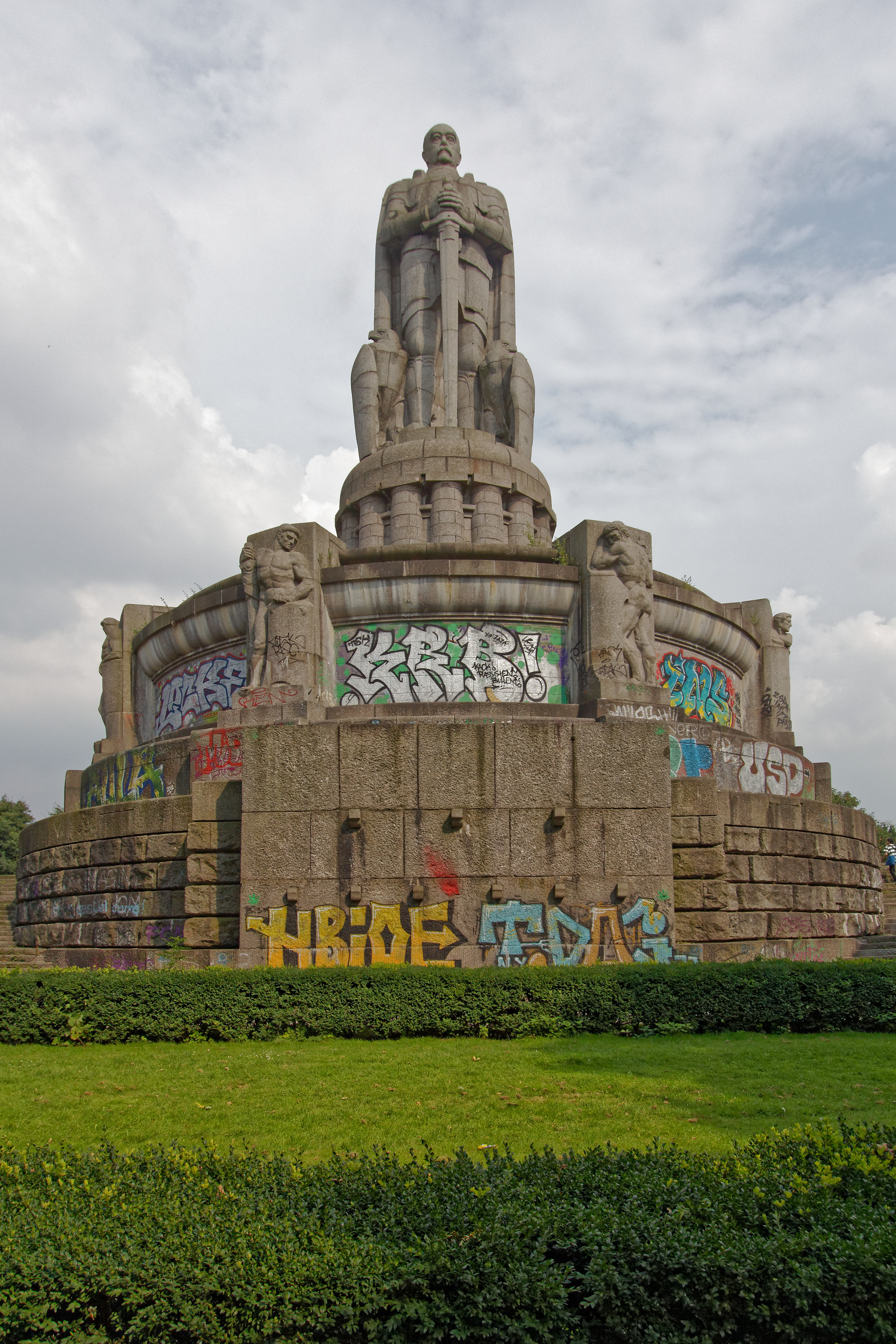 Hamburg, Bismarck-DenkmalThis is a photograph of an architectural monument.